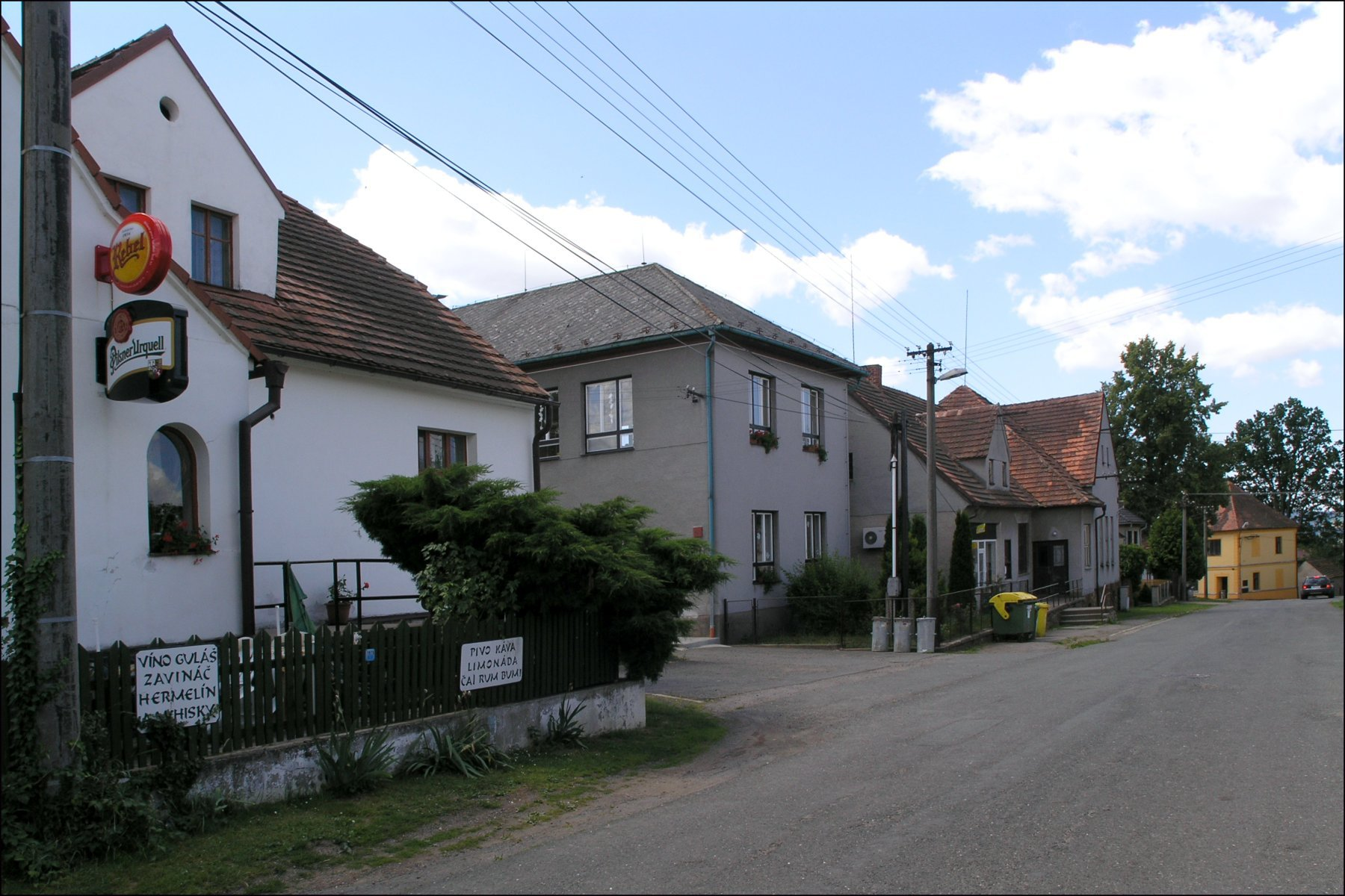 Hněvkovice, okres Havlíčkův Brod